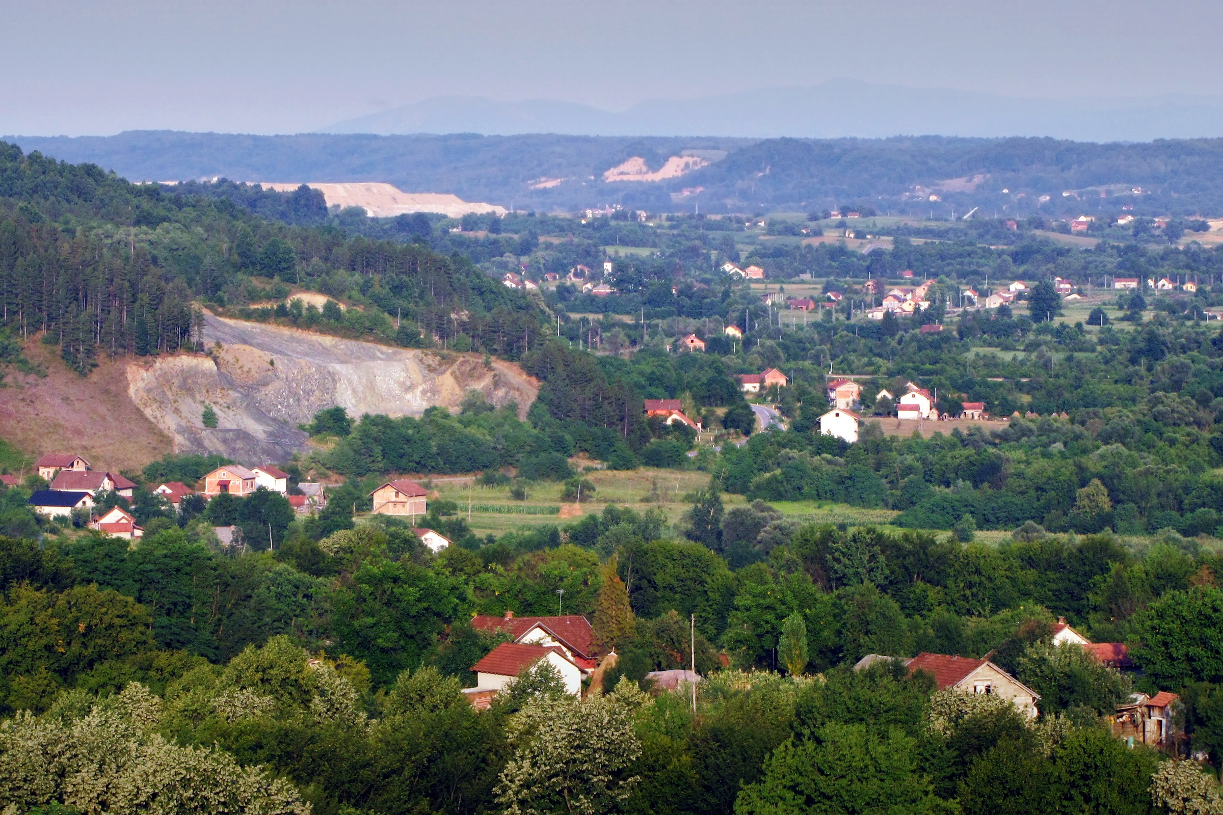 Драгаловци